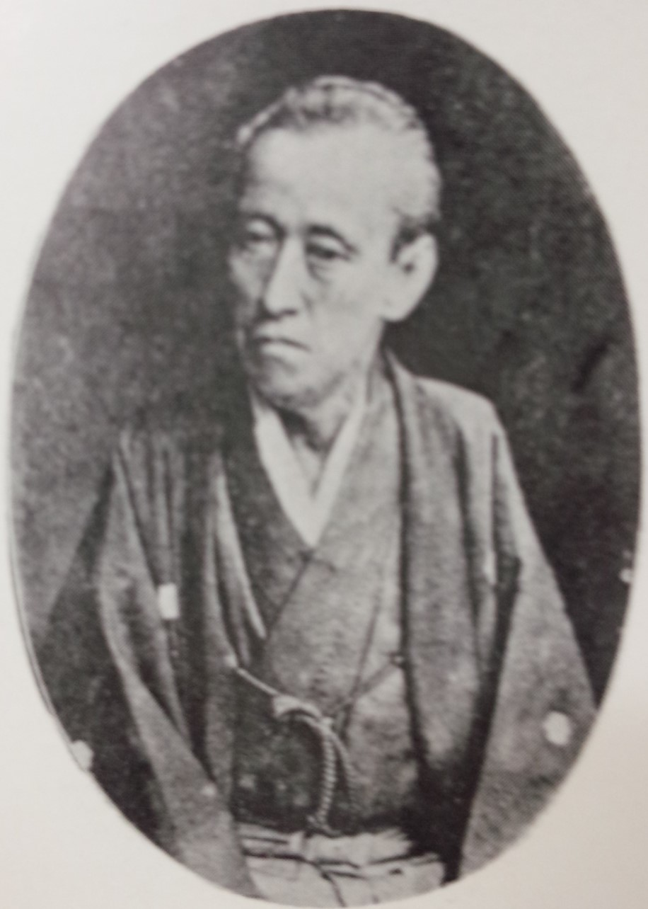 松平慶憲の肖像写真。